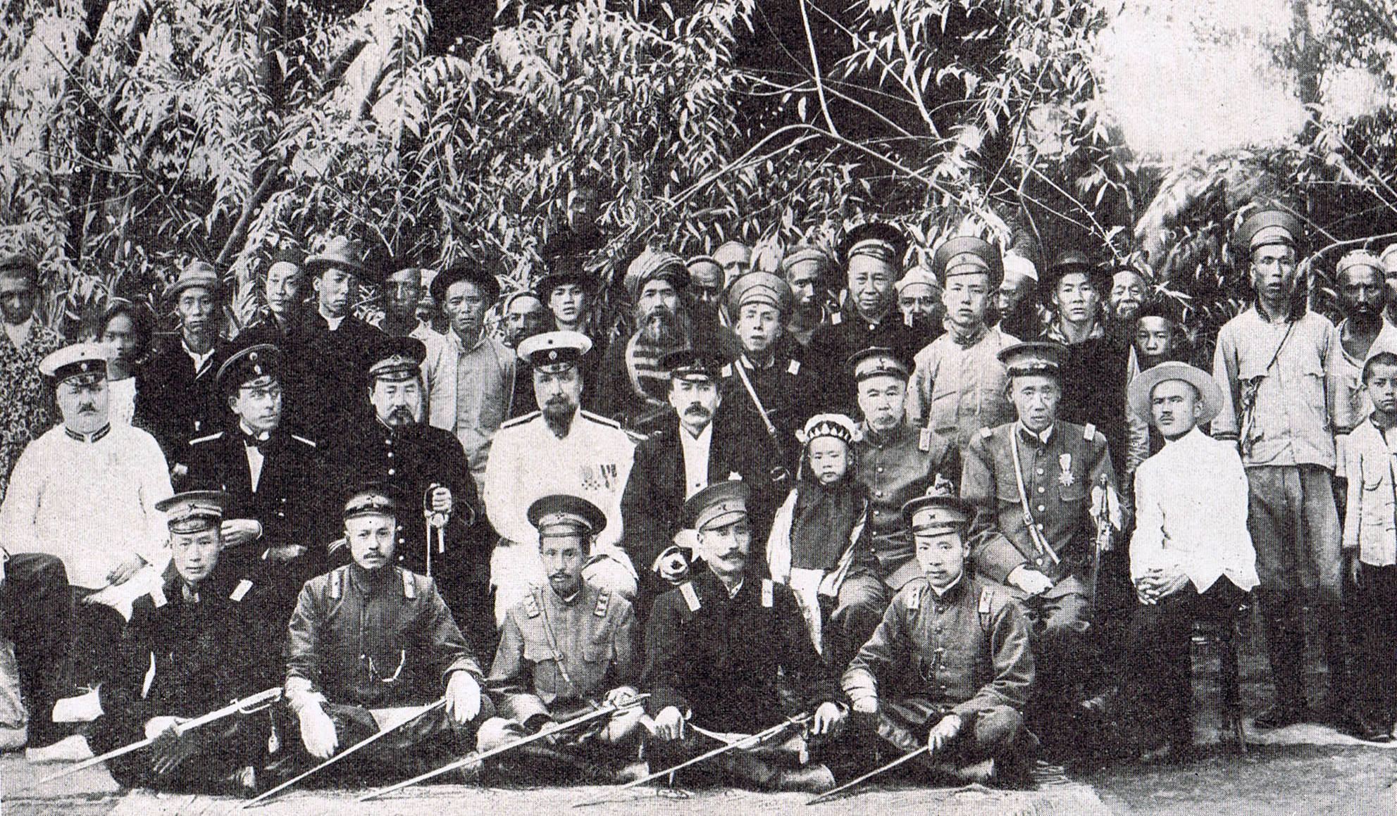 Российский консул С. В. Соков (второй ряд, четвертый слева), британский консул Дж. Макартни (справа от Сокова) с даотаем Кашгара (слева от Сокова) и чинами кашгарской администрации. Кашгар, ок. 1912 г.